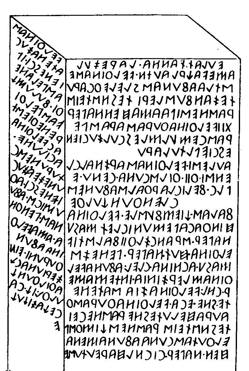 Cippo di Perugia, in lingua etrusca (trascrizione). Esposto al Museo archeologico nazionale dell'Umbria a Perugia. This is the image from the public Russian book og G.S. Grinevich.